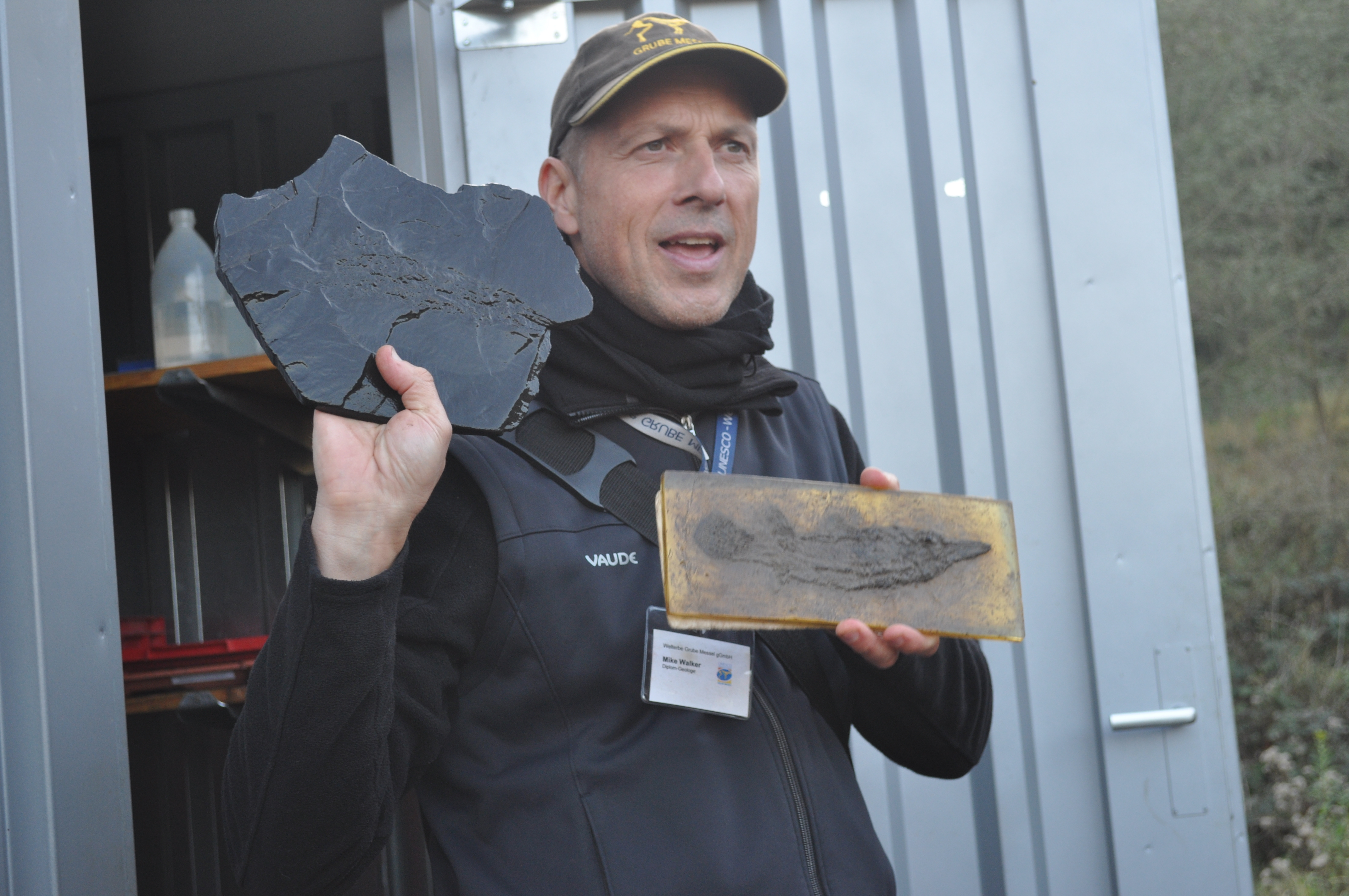 Un geólogo guía didácticamente a los visitantes en Messel. En la foto, enseña alzando en su mano derecha la muestra fósil de un pez del eoceno hallada en Messel (retirada recién del agua, donde se conserva para luego prepararse) y en su mano izquierda la reproducción ya preparada que se muestra en los museos.